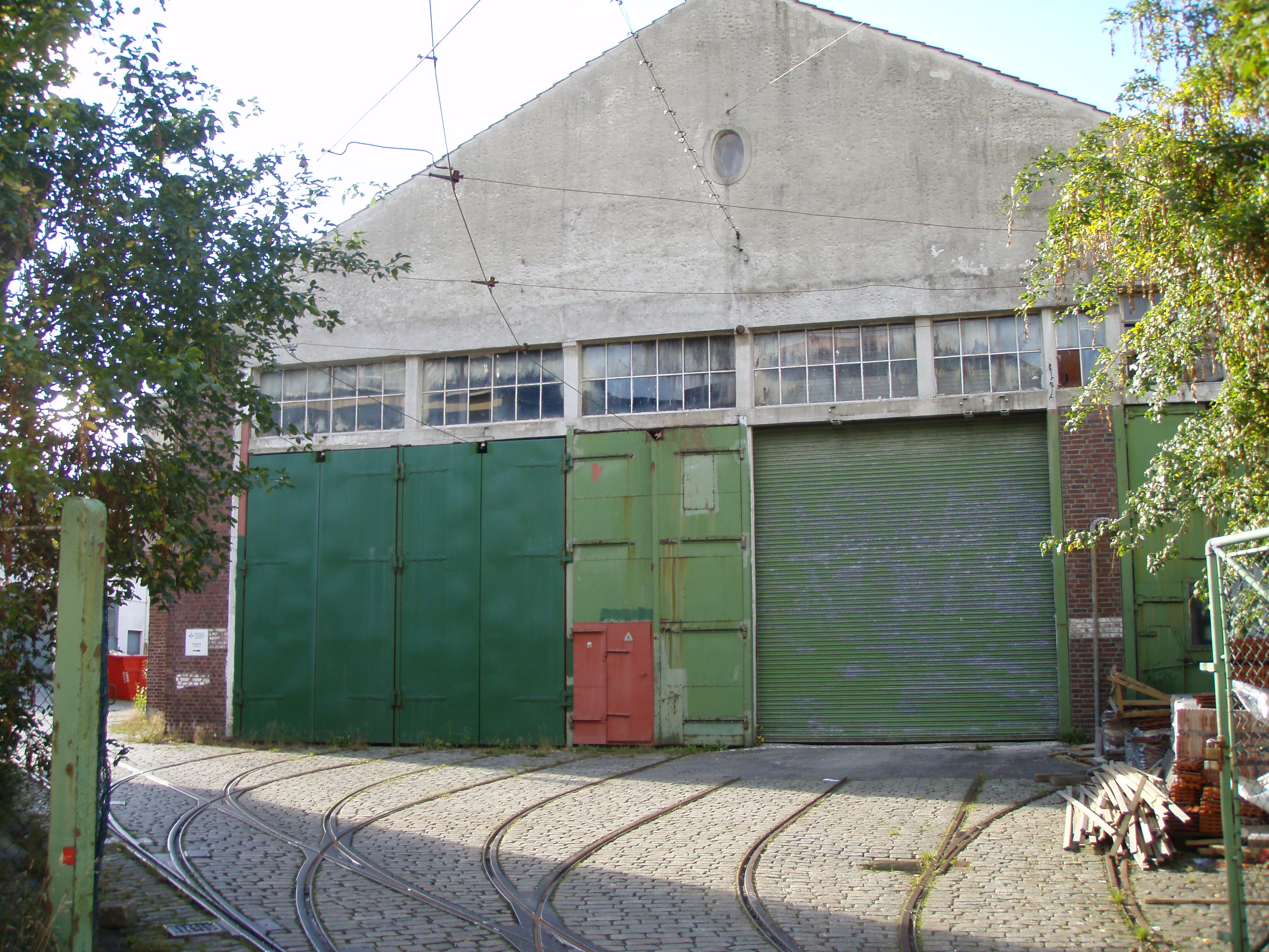 tram-car- remise (trikkestall) Bergen, Norway